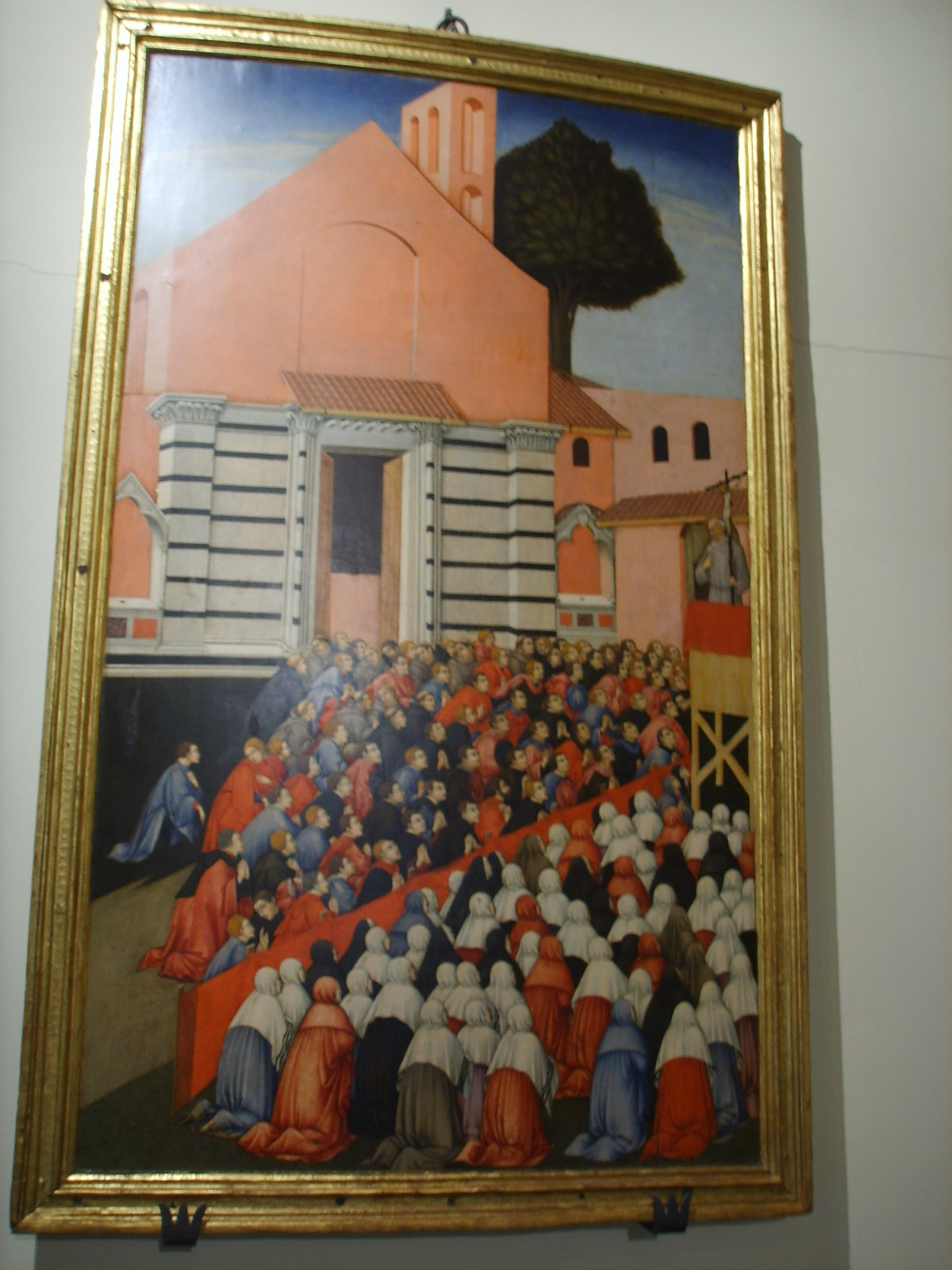 Painting, Opera del Duomo Museum in Siena, Italy